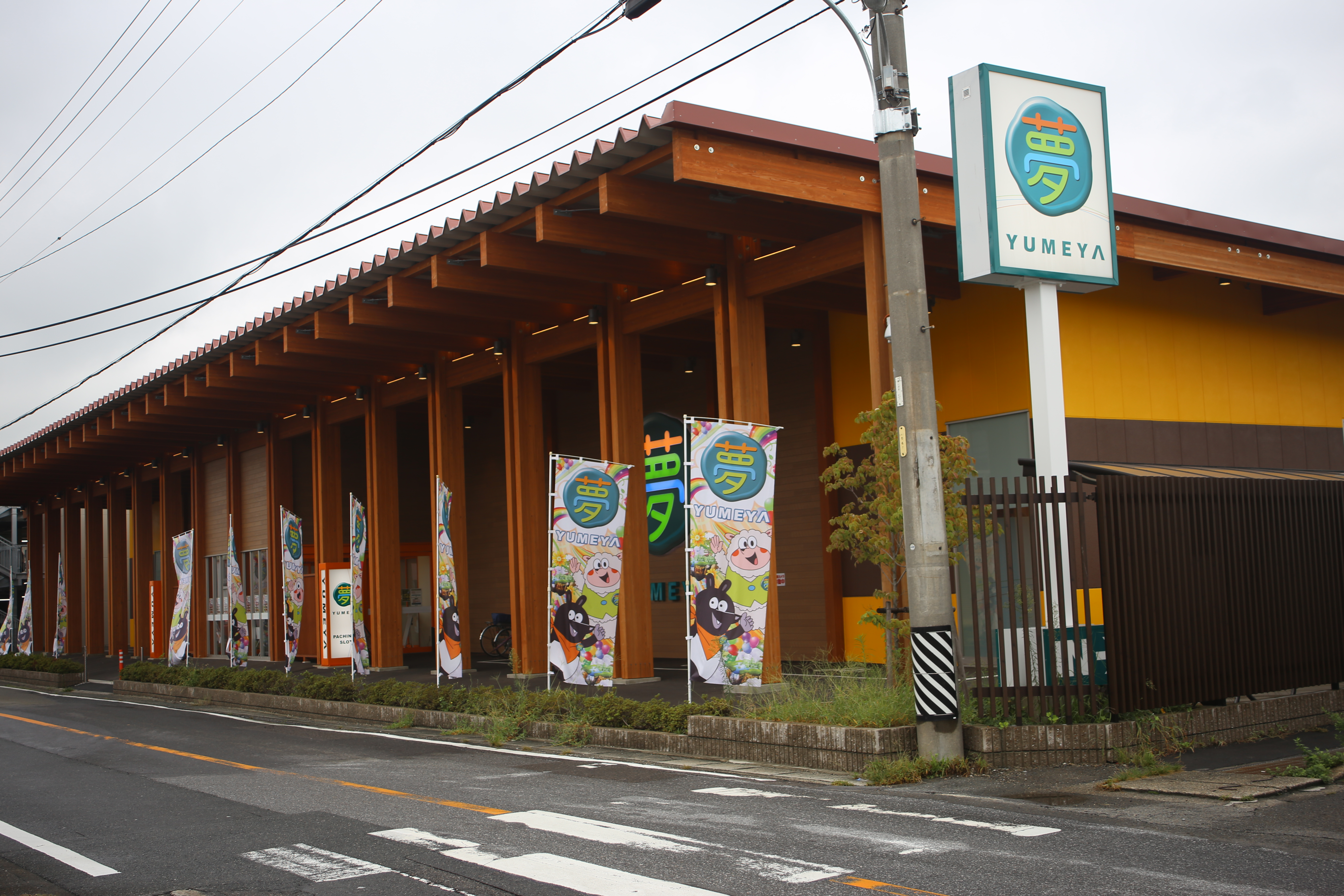 愛知県稲沢市祖父江町のパチンコ店夢屋祖父江店